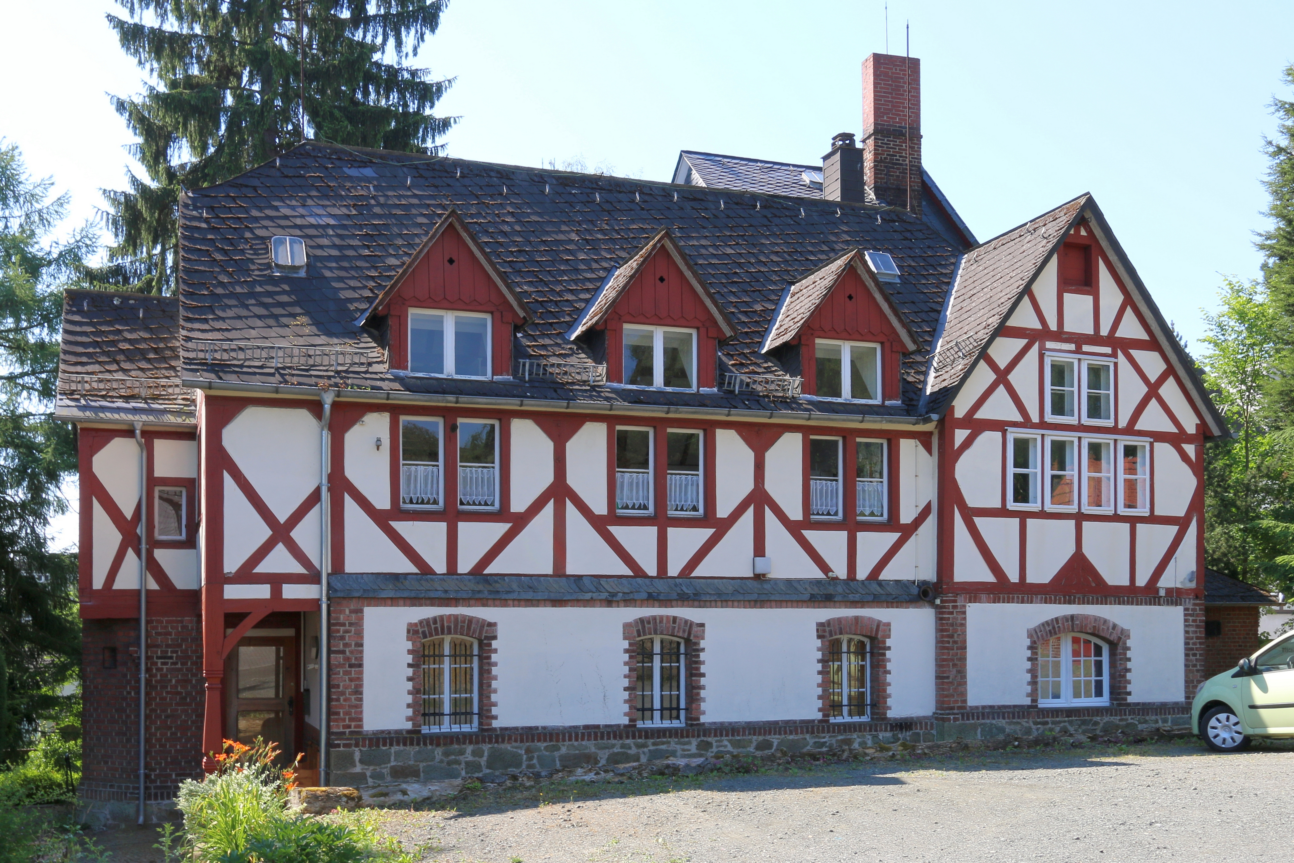 Herborn, Lahn-Dill-Kreis: Wohn- und Atelierbau Hofmann Nassaustraße 38